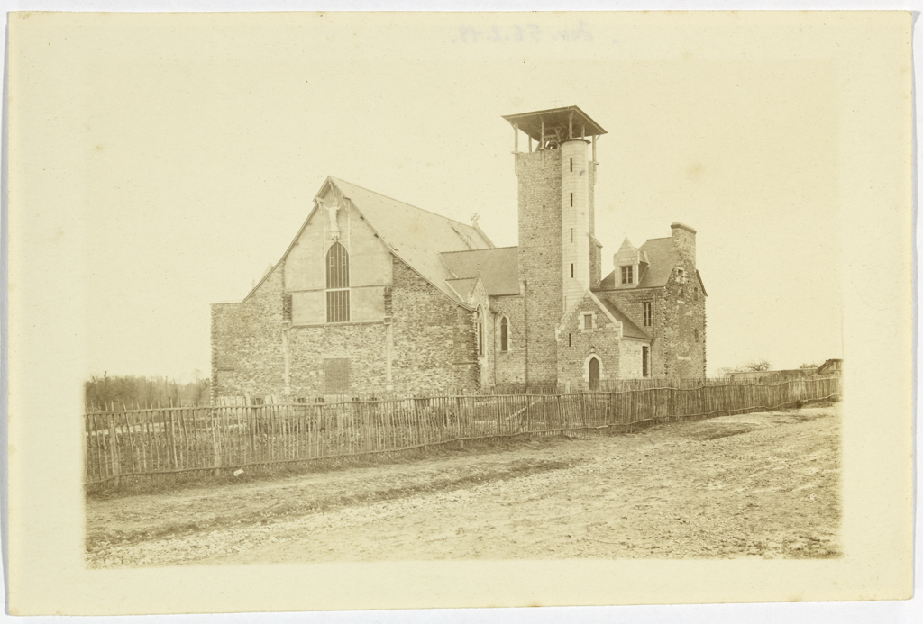 Vue sur l'église du Sacré-Coeur, prise de l'Ouest. Sur la droite du bâtiment, le presbytère. L'église est en cours de construction. L'église du Sacré-Coeur a été construite par Arthur Regnault de 1908 à 1913. Le presbytère adjacent du même architecte a été édifié en 1911. La tour du clocher a été terminée en 1960 par une flèche en charpente, oeuvre des architectes Derrouch et Rual. Les vitraux sont signés Loire à Chartres. Une mosaïque d'Odorico est visible dans la chapelle du bas-côté ouest.